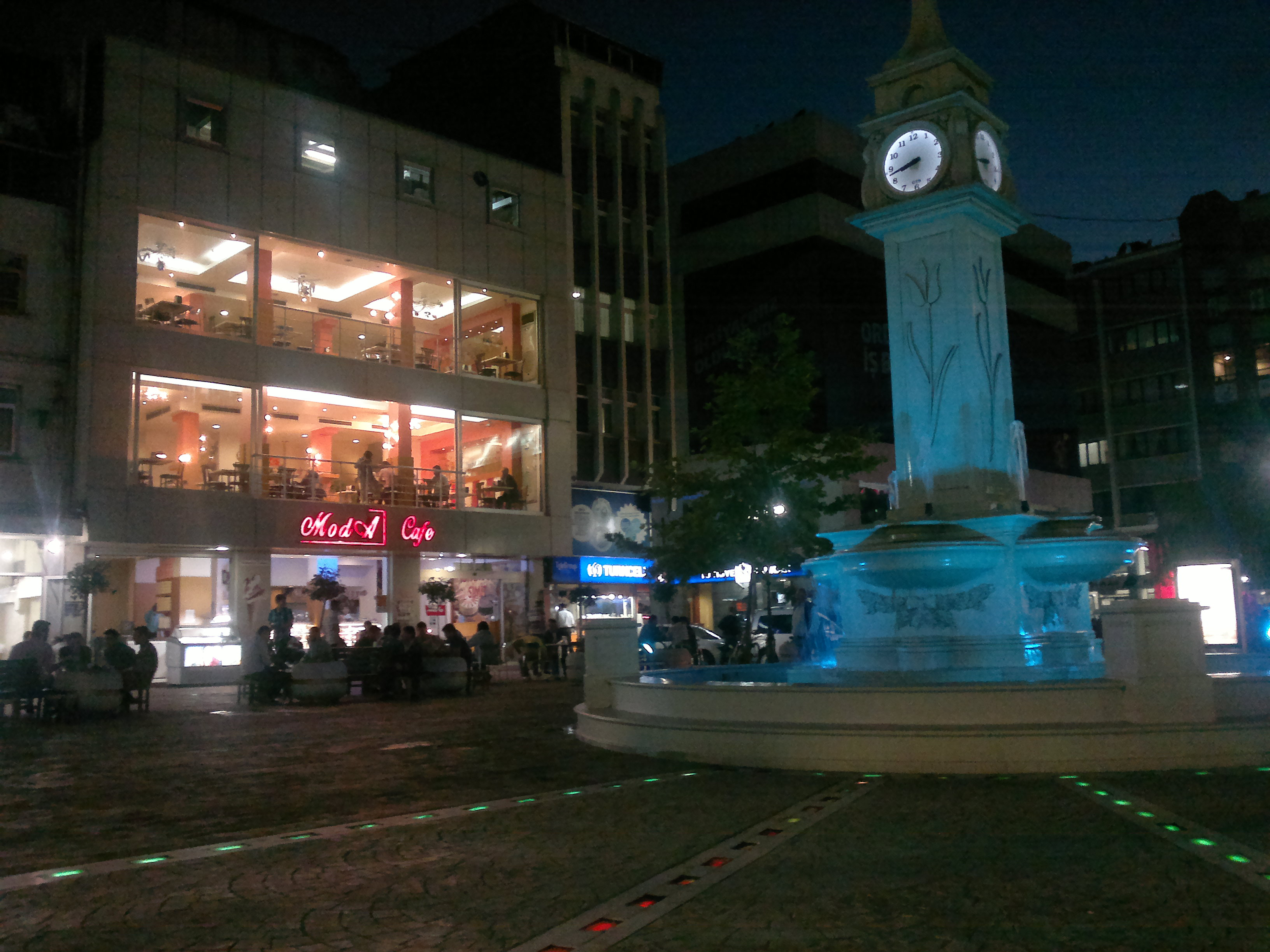 Fatsa Meydanı